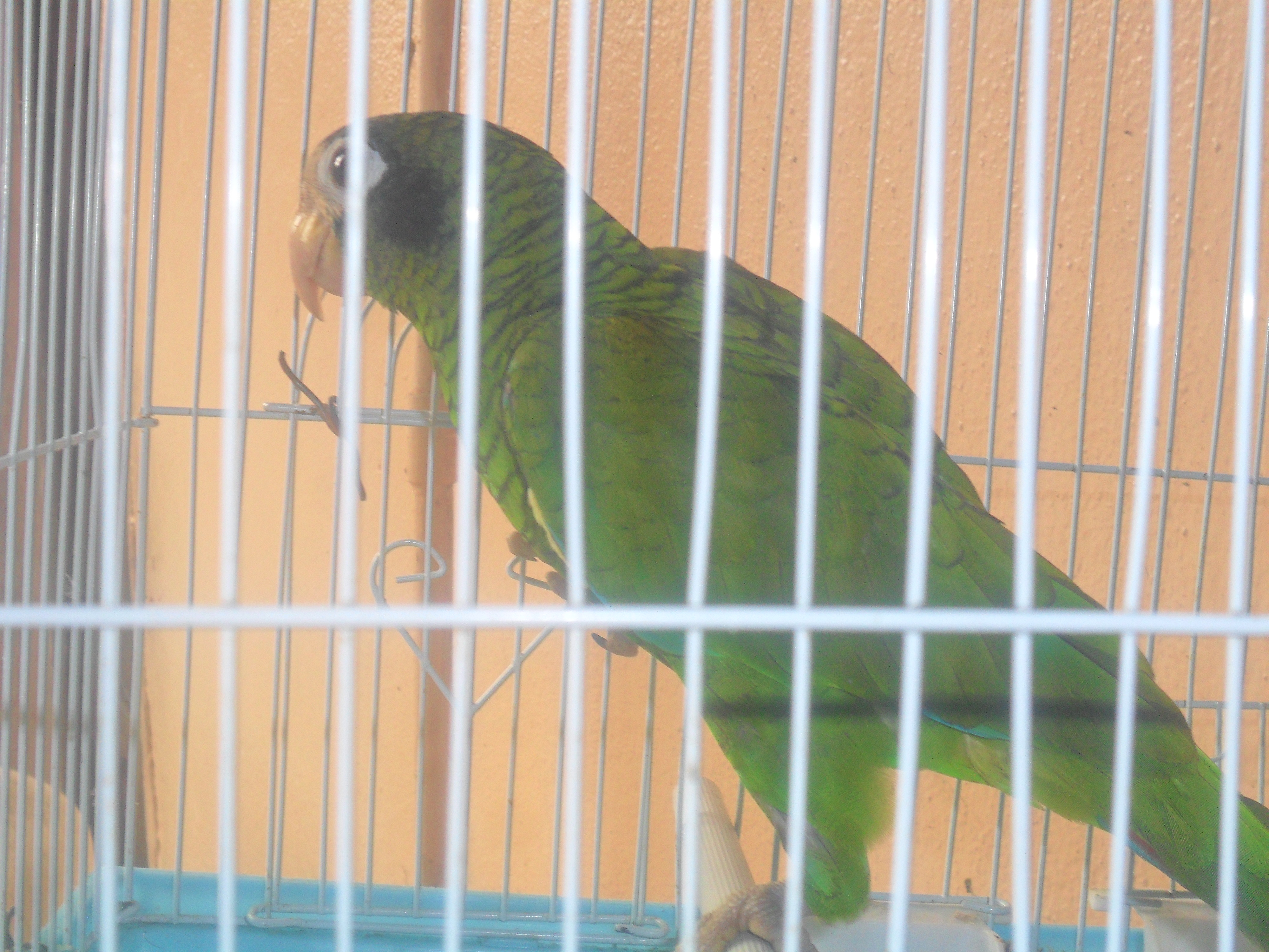 ave domestica, sector Sarmiento, San Pedro de Macorís